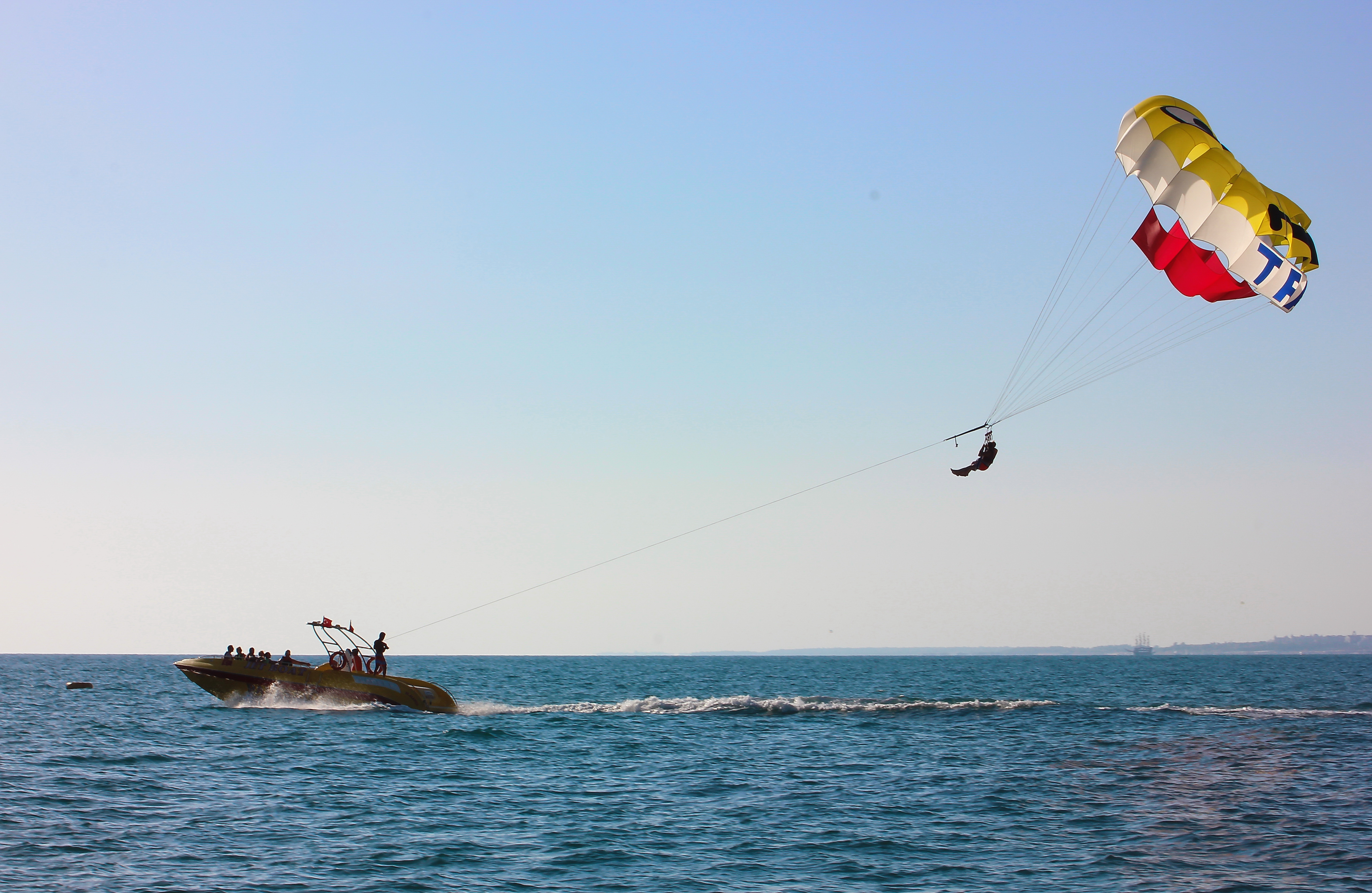 Parasailing im Meer vor Kumköy in der Türkei